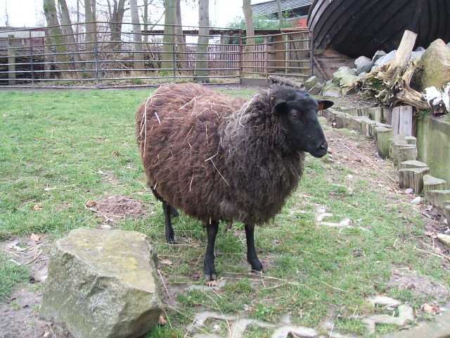 Langhaariges Pommersches Landschaf im Tierpark Stralsund.